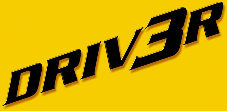 Logo des Videospiels Driver 3